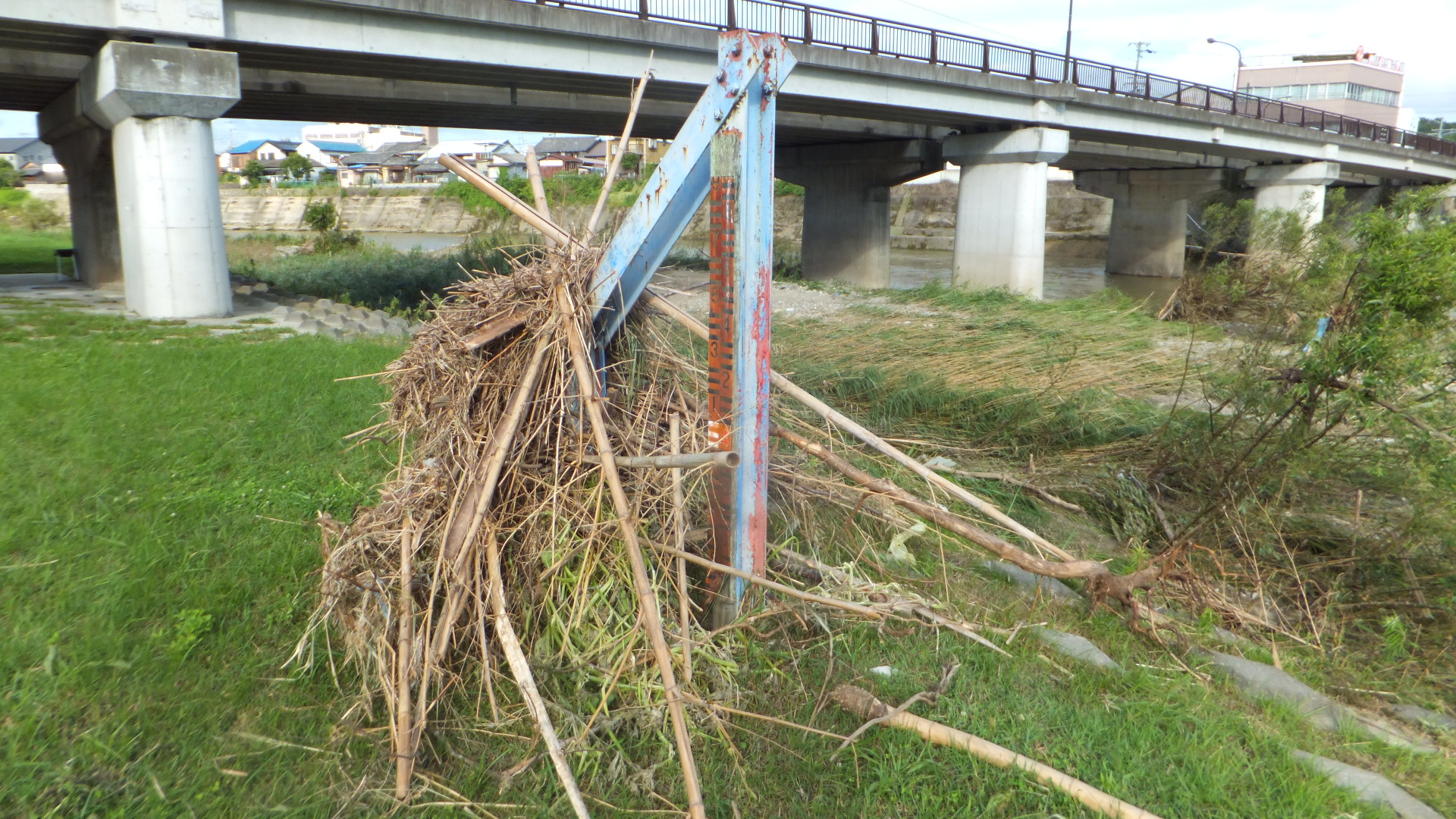 平成27年台風第11号によって被害が出た美嚢川 兵庫県三木市末広にて